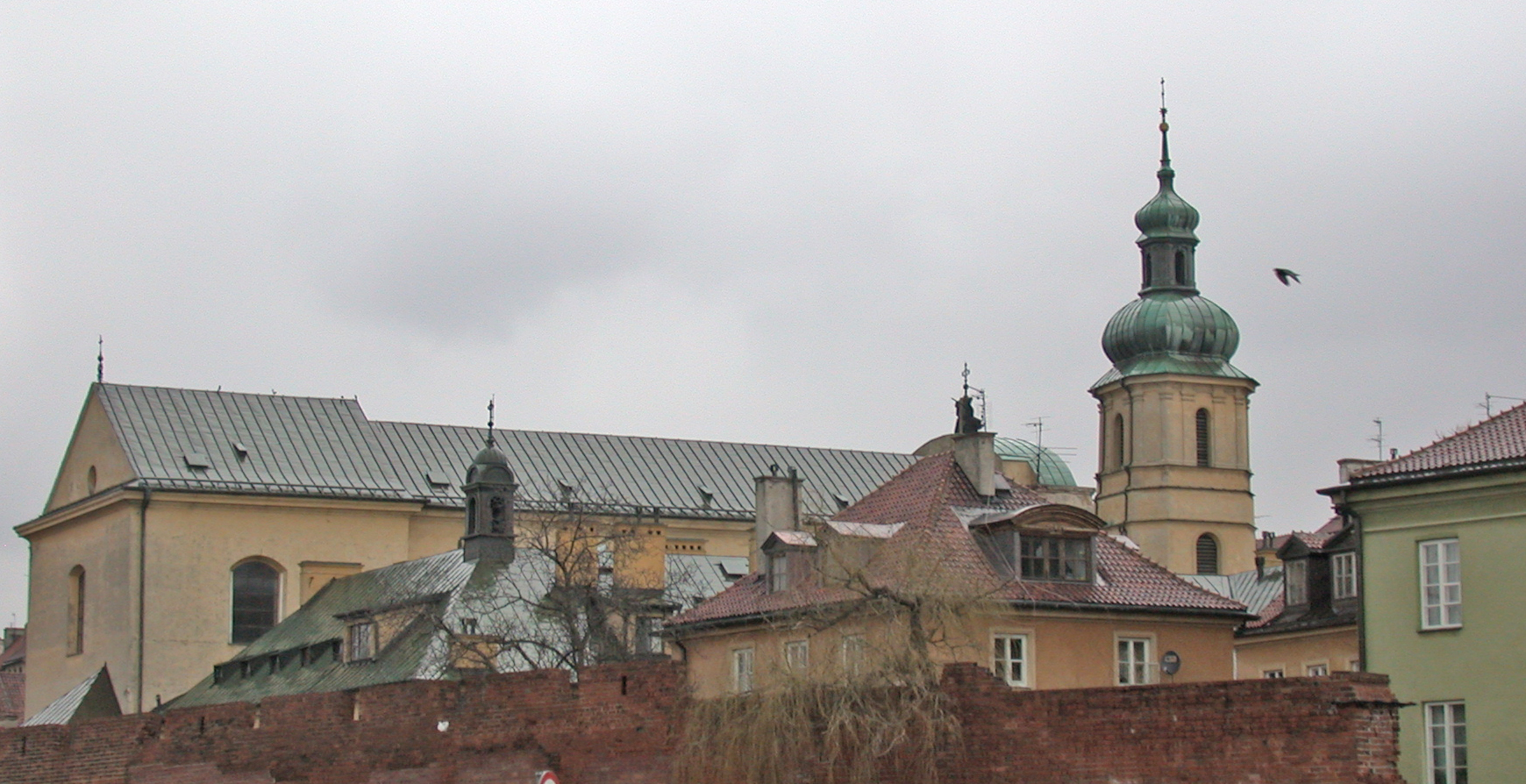 Varsavia, chiesa di San Martino (kośsciół Św. Marcina), retro dietro le mura, dalla piazza del Castello Reale (plac Zamkowy).